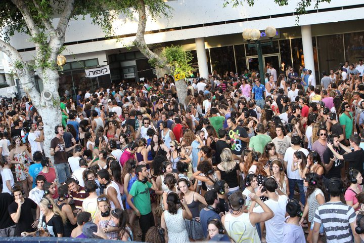 מסיבת אוניות Wi Party בכיכר דיזנגוף בתל אביב